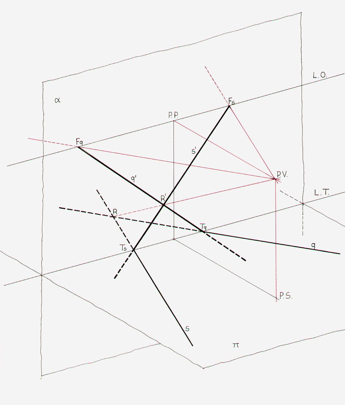 Disegno schematico degli elementi di riferimento di una prospettiva centrale. Il file è stato creato scandendo il disegno con uno scanner.